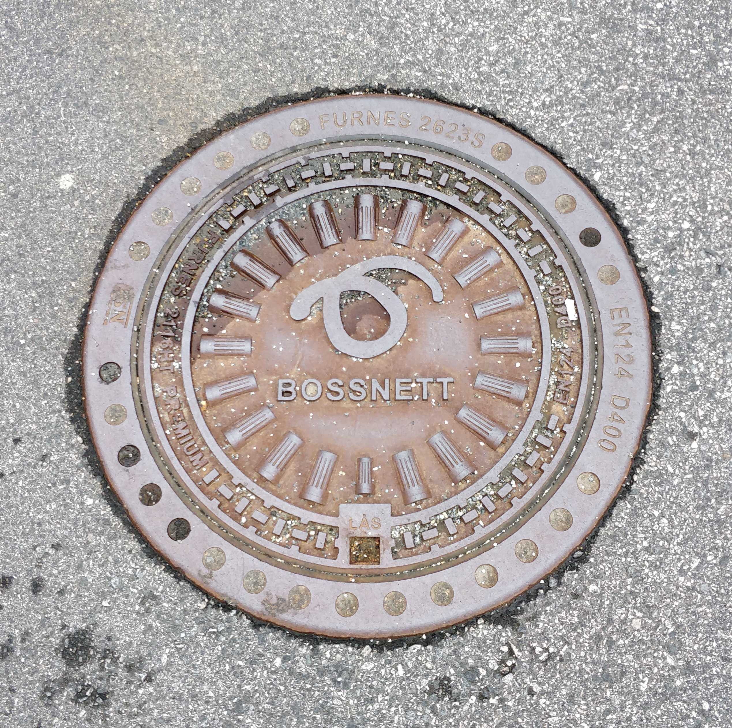 Bossnettet i Bergen har stakehull hver hundrede meter langs bossnettet og egne bekkalokk til hullene